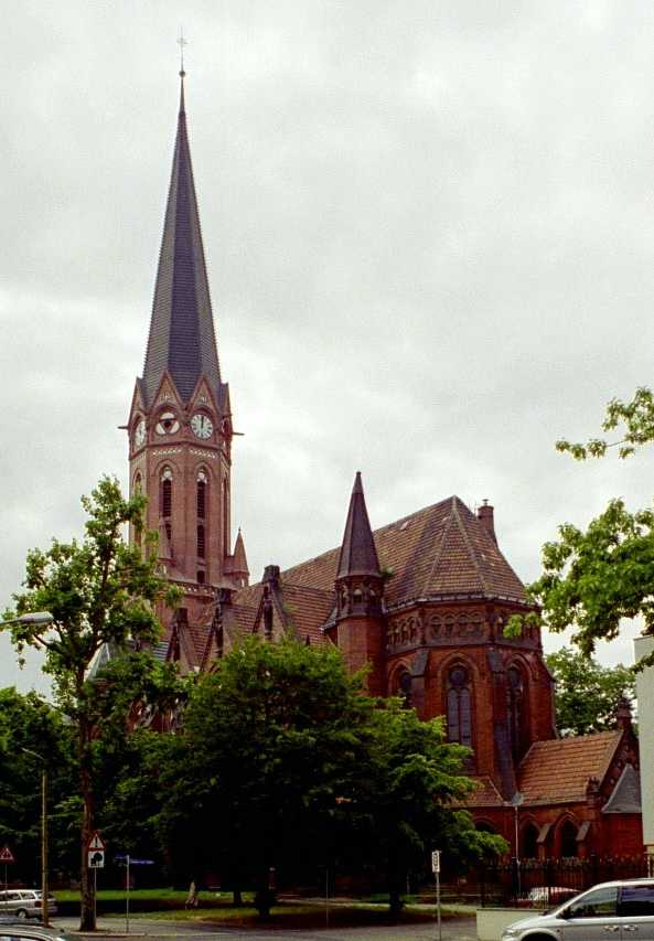 Heilandskirche im Leipziger Stadtteil Plagwitz Fotograph: André Loh-Kliesch, August 2003 Hinweis: vom Autor (=Fotograph) auch in [1] benutzt